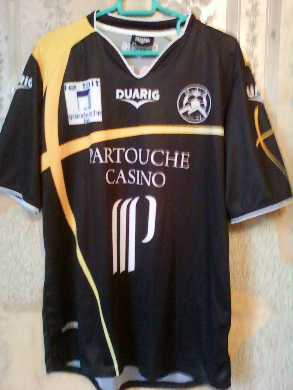 Maillot domicile de l'UJA Alfortville entre 2008 et 2010